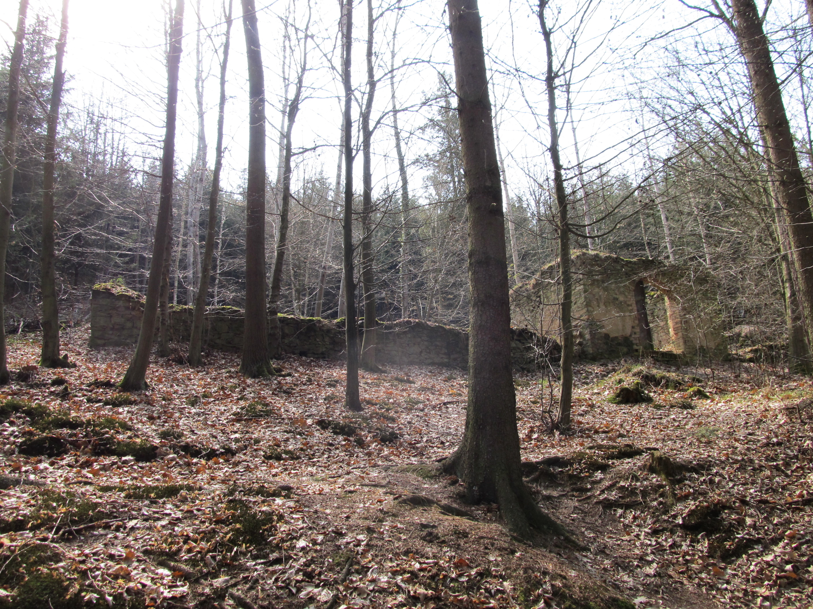 Hřešihlavy ŽH